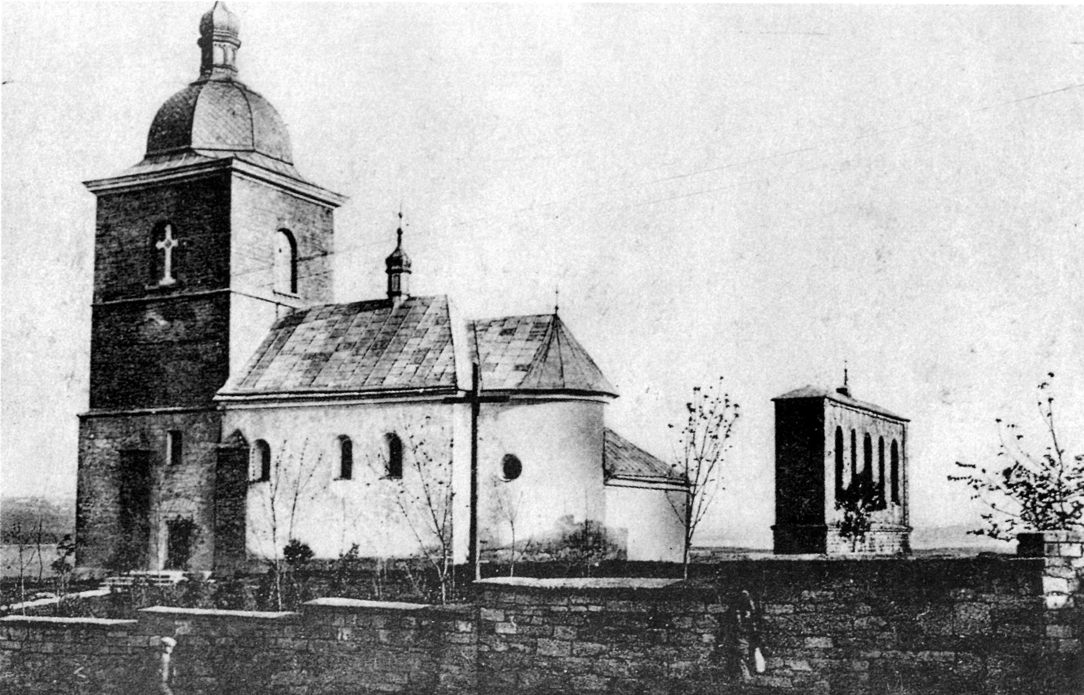 Церква над ставом у Тернополі: Церква над ставом на поч. ХХ ст.